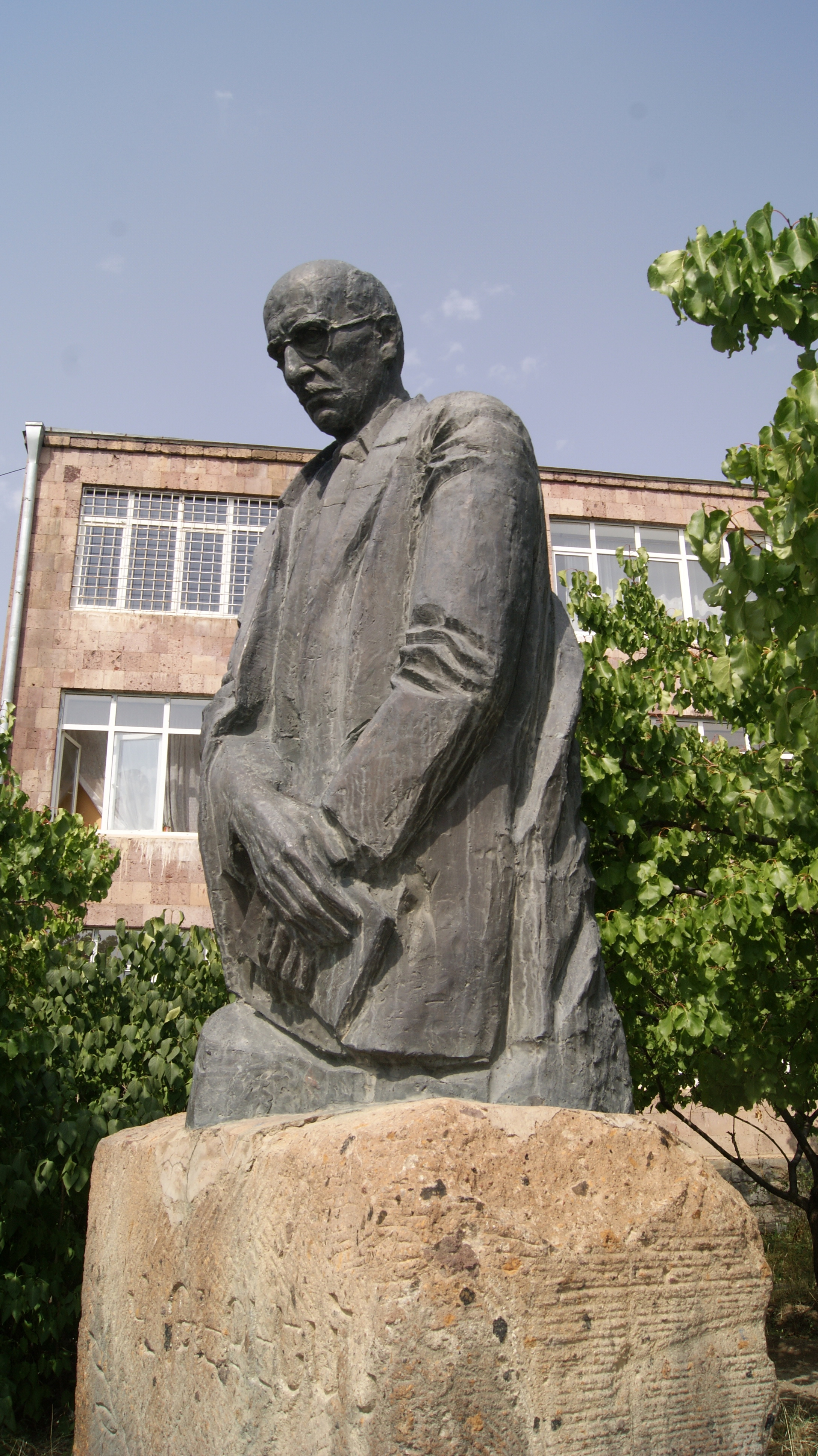 Վահան Թեքեյանի հուշարձանը Կարբիի համանուն դպրոցի առջև 58/20